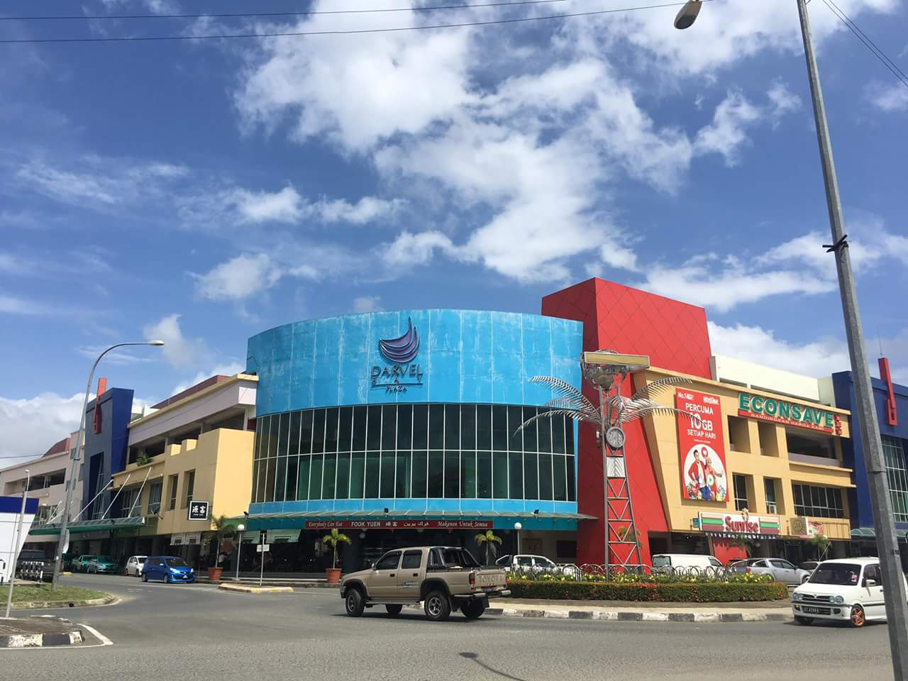 Lahad Datu